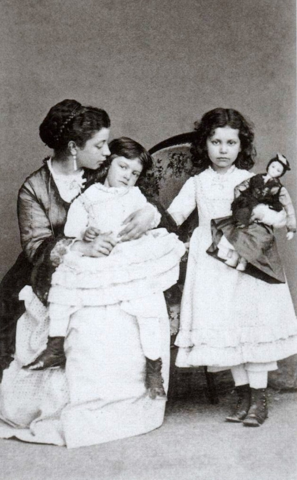 Photographie de Lina Calamatta (1842-1901), épouse de Maurice Dudevant, et ses deux filles, Aurore et Gabrielle Dudevant. Lina Calamatta est la belle-fille de la romancière George Sand. Auteur : Placide Verdot, photographe au n° 54 rue Grande à Châteauroux, dans le département de l'Indre. Il réalise également une série de photographies sur le domaine de Nohant en 1875, à la demande de George Sand. Fonds Sand à la Bibliothèque historique de la Ville de Paris.